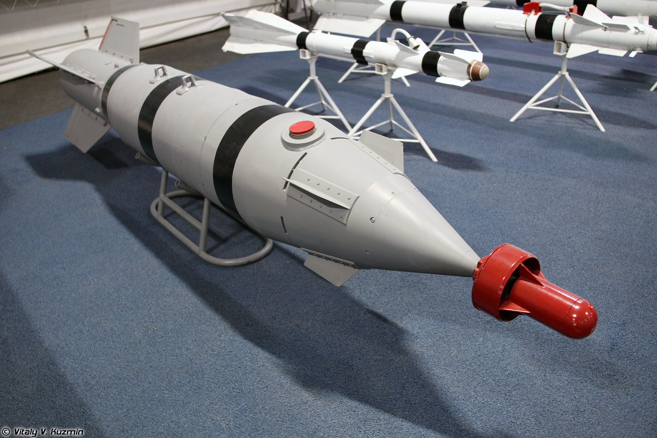 Корректируемая авиационная бомба КАБ-500Л